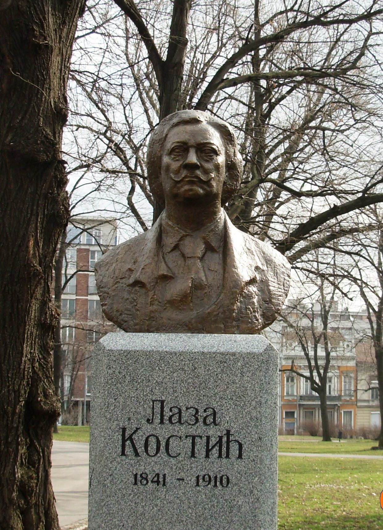 Laza Kostić, bista na Kalimegdanu, Beograd. Slikao Goldfinger